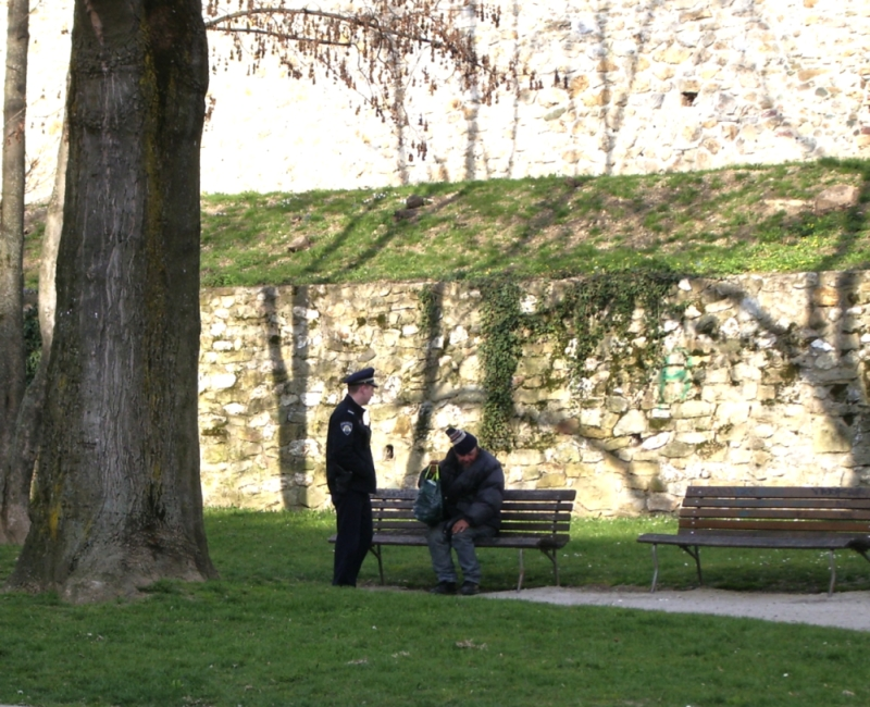 Beskućnik u Tkalčićevoj ulici u Zagrebu.